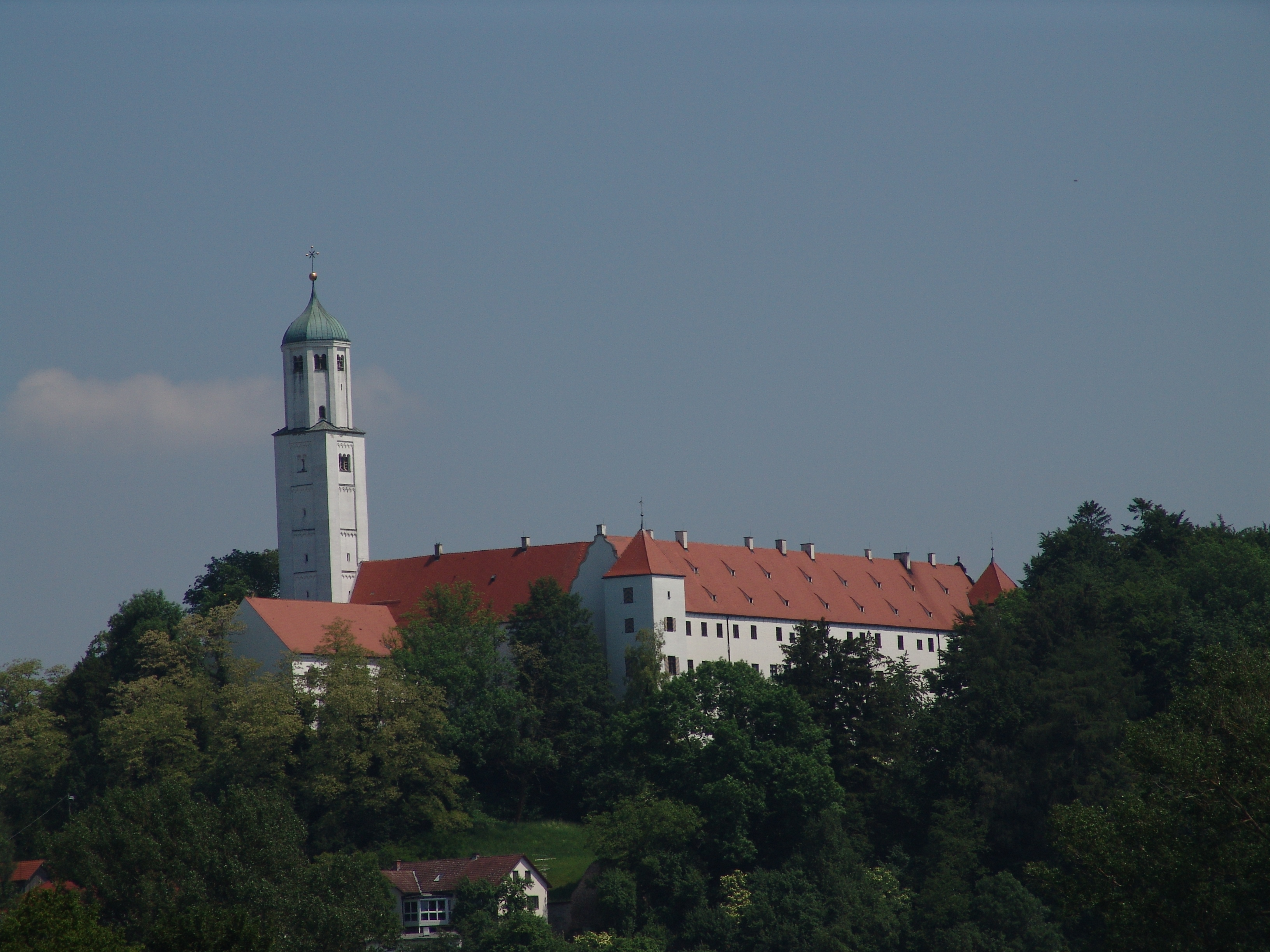 Fugger-Schloss Kichheim